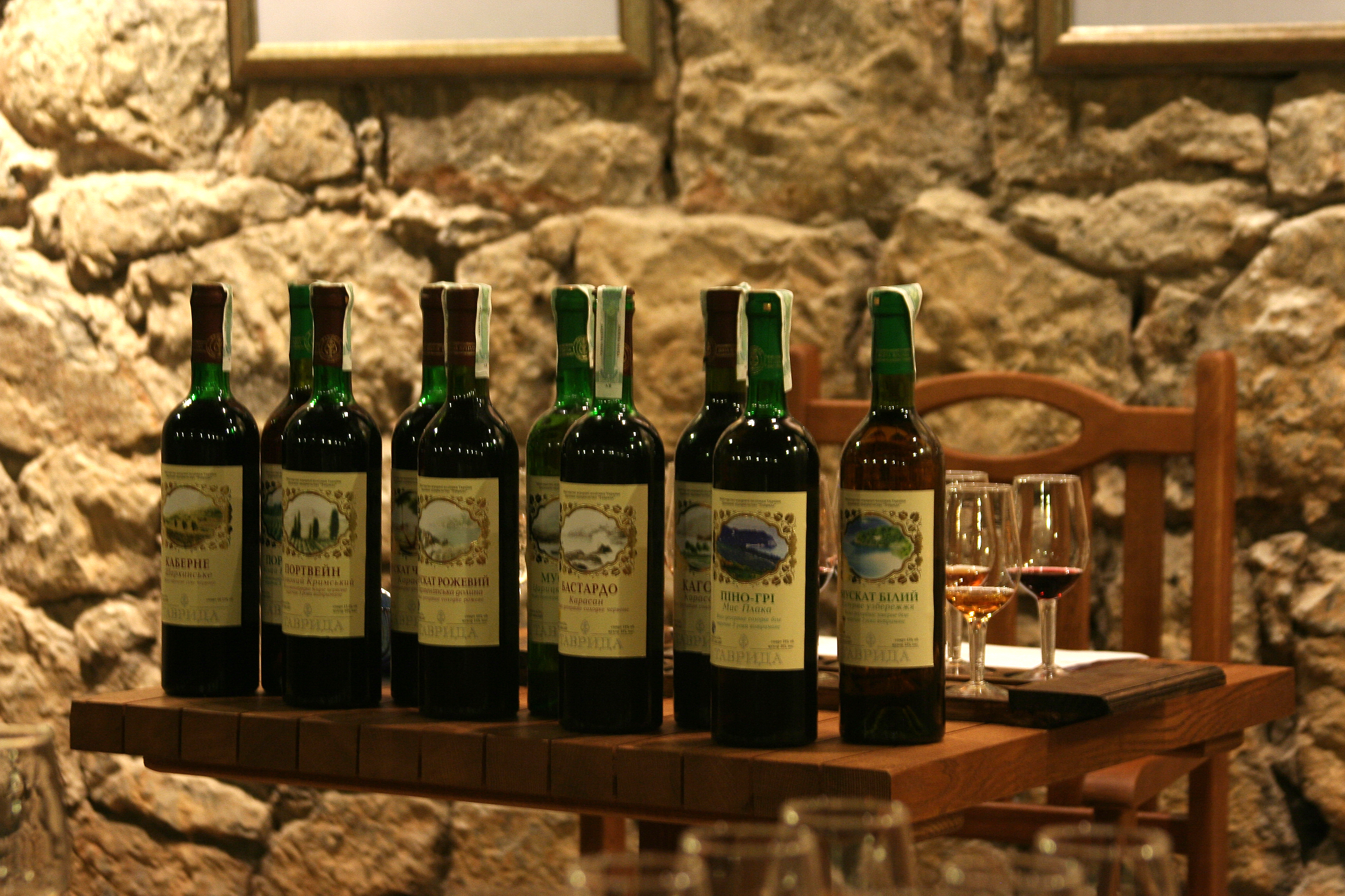 Образцы вин "Тавриды"